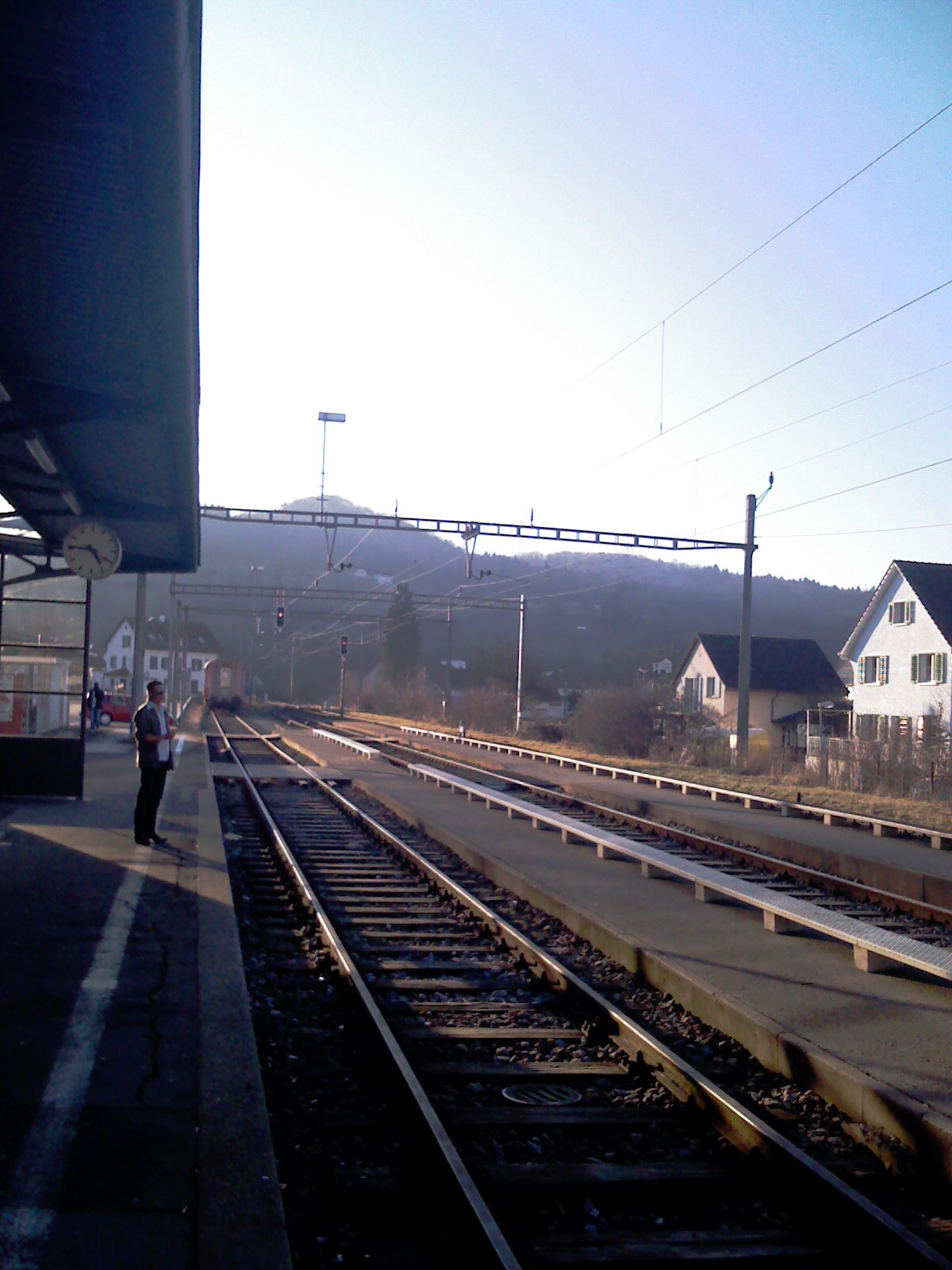 Rigardo al la direkto de Rorbas, de la stacidomo Embrach-Rorbas, en la distrikto Bülach, Kantono Zurikio. Foto farita de Dietrich Michael Weidmann Kategorio:Bildoj de Kantono Zuriko Kategorio:Bildoj alŝutitaj de DidiWeidmann Kategorio:Bildoj faritaj de DidiWeidmann